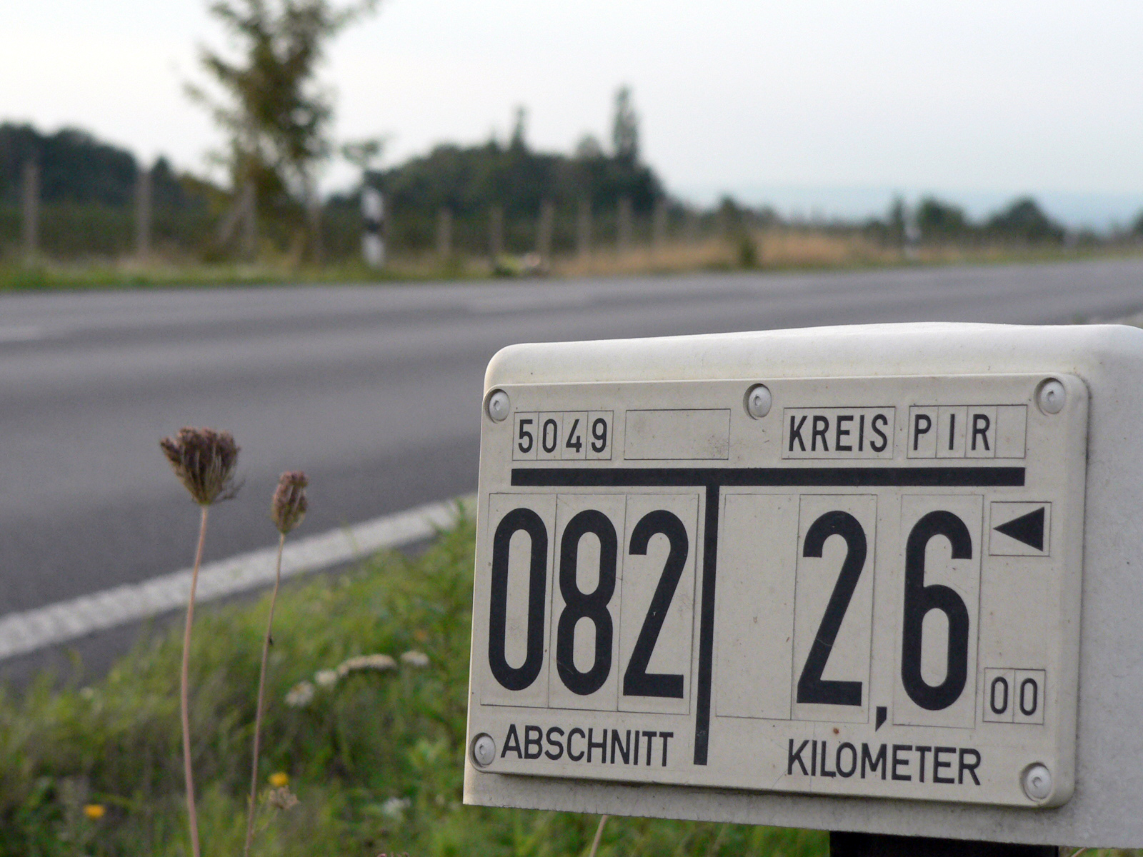 Kilometerstein an der Bundesstraße 172 südöstlich Pirna-Krietzschwitz, Sachsen